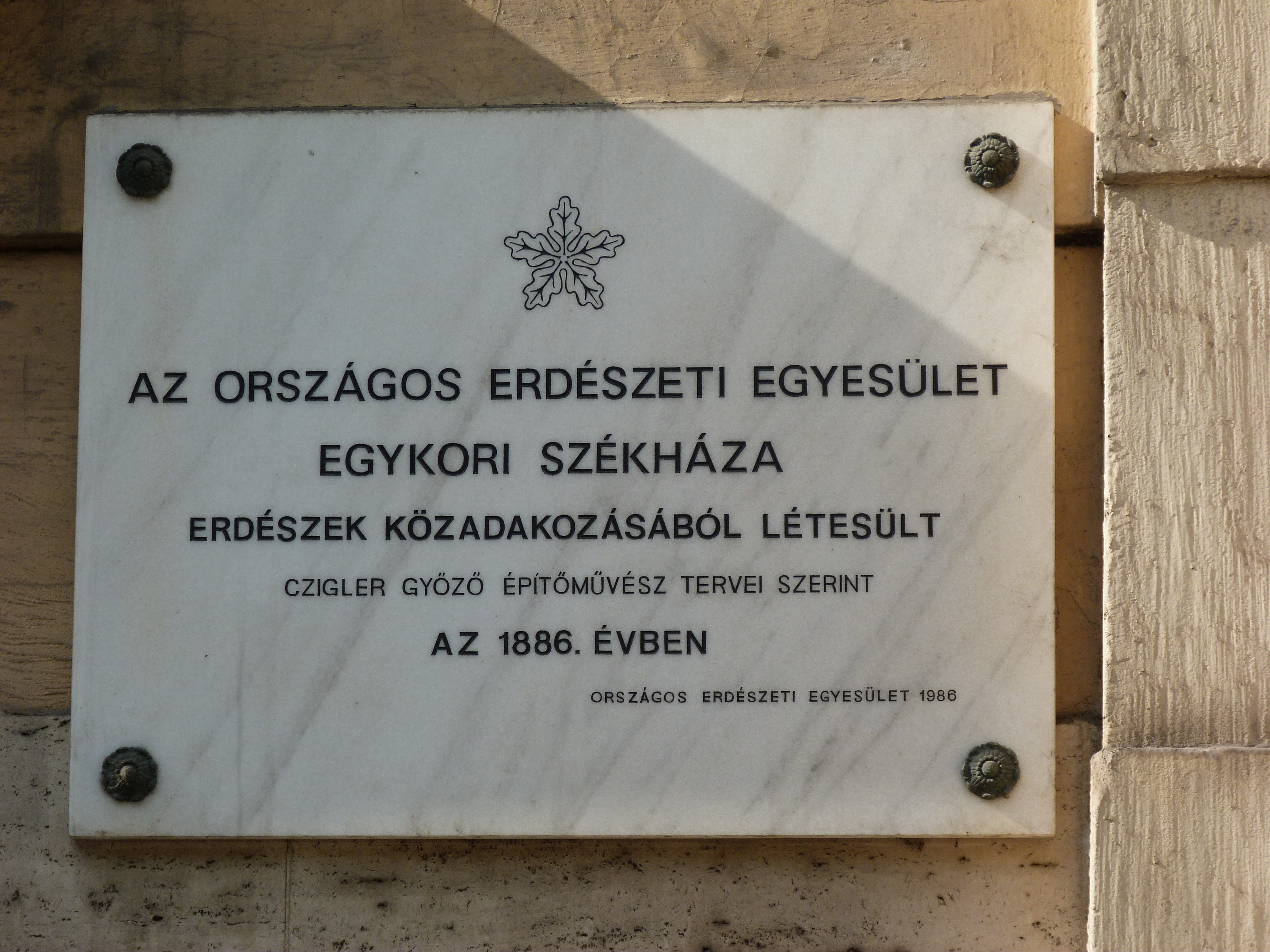 A felvétel 2012. május 19 -én készült Budapesten, az Alkotmány utcában. Az Országos Erdészeti Egyesület emléklapja. ©© Derzsi Elekes Andor, Budapest, 2013, You are authorised to use these photos and vids under Creative Commons – even for commercial, for profit purposes. Photos must be attributed to Derzsi Elekes Andor. All of the photos and vids in the Metapolisz DVD line are under Creative Commons and can be used even for commercial – for profit – purposes. Recommended Citation Derzsi Elekes Andor: Metapolisz DVD line